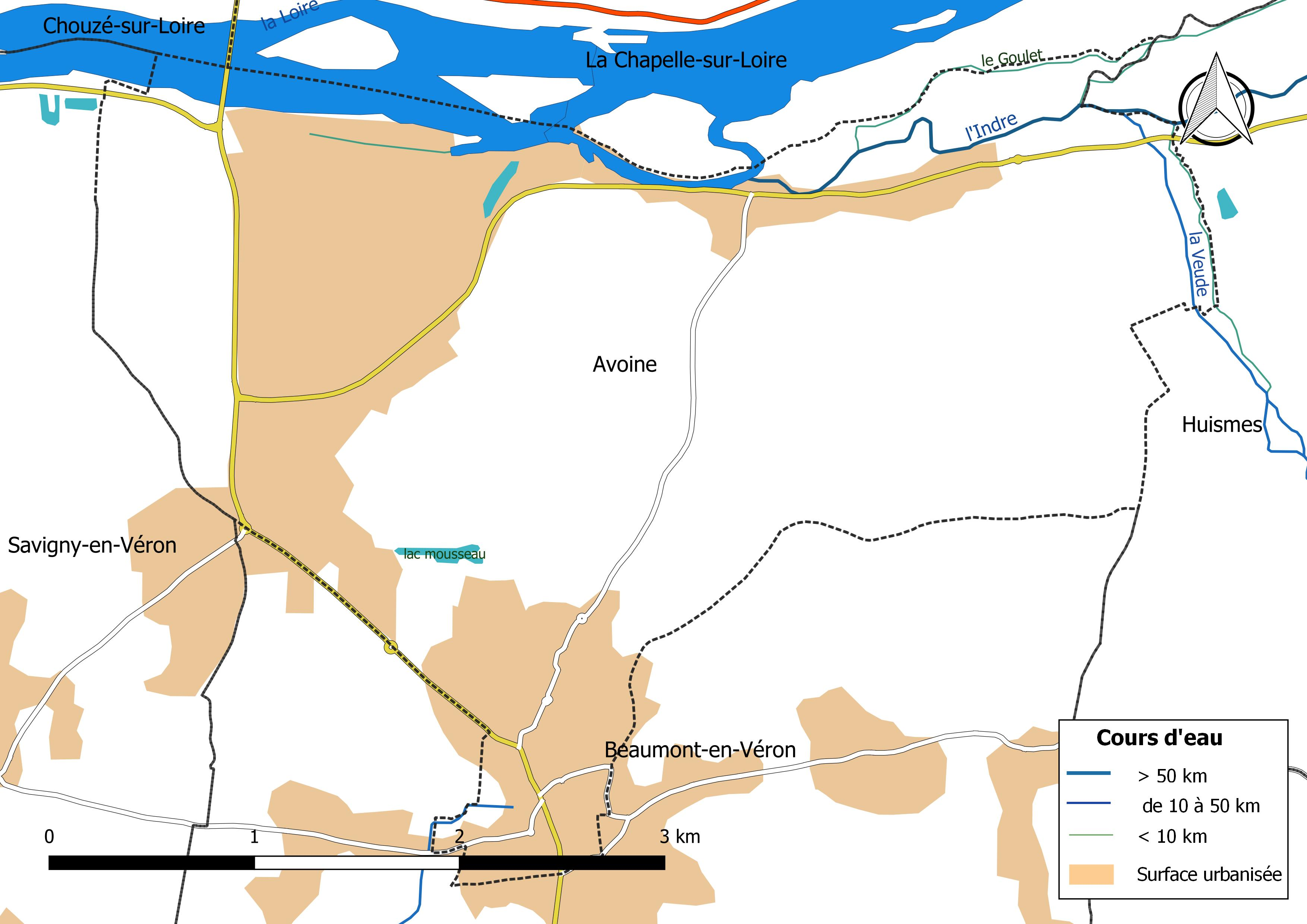 Carte du réseau hydrographique de la commune de Avoine (Indre-et-Loire) (France).